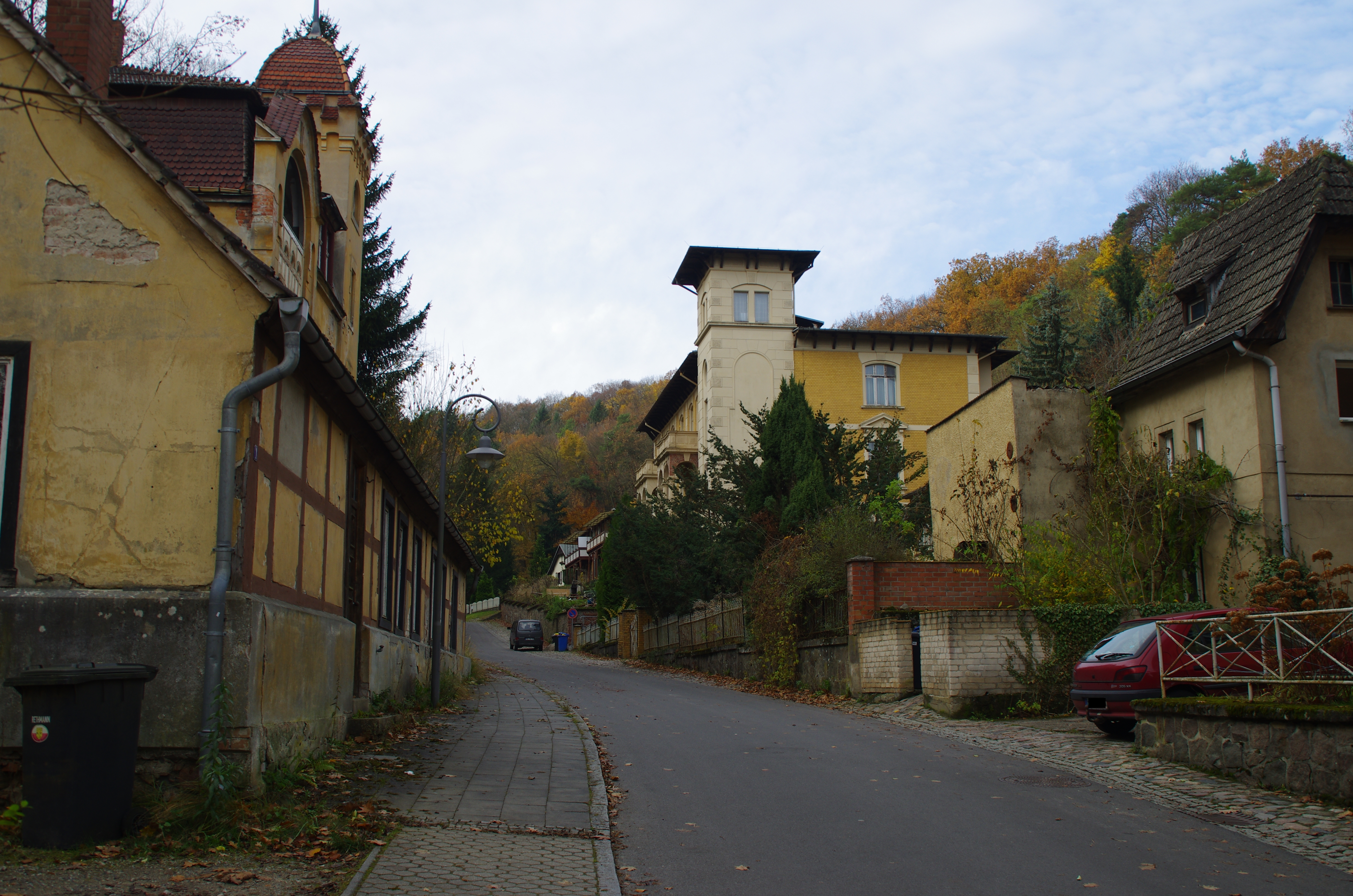 Bad Freienwalde (Oder) in Brandenburg. Die Straße Heilige Hallen befindet sich in der Nähe des Kurparkes.